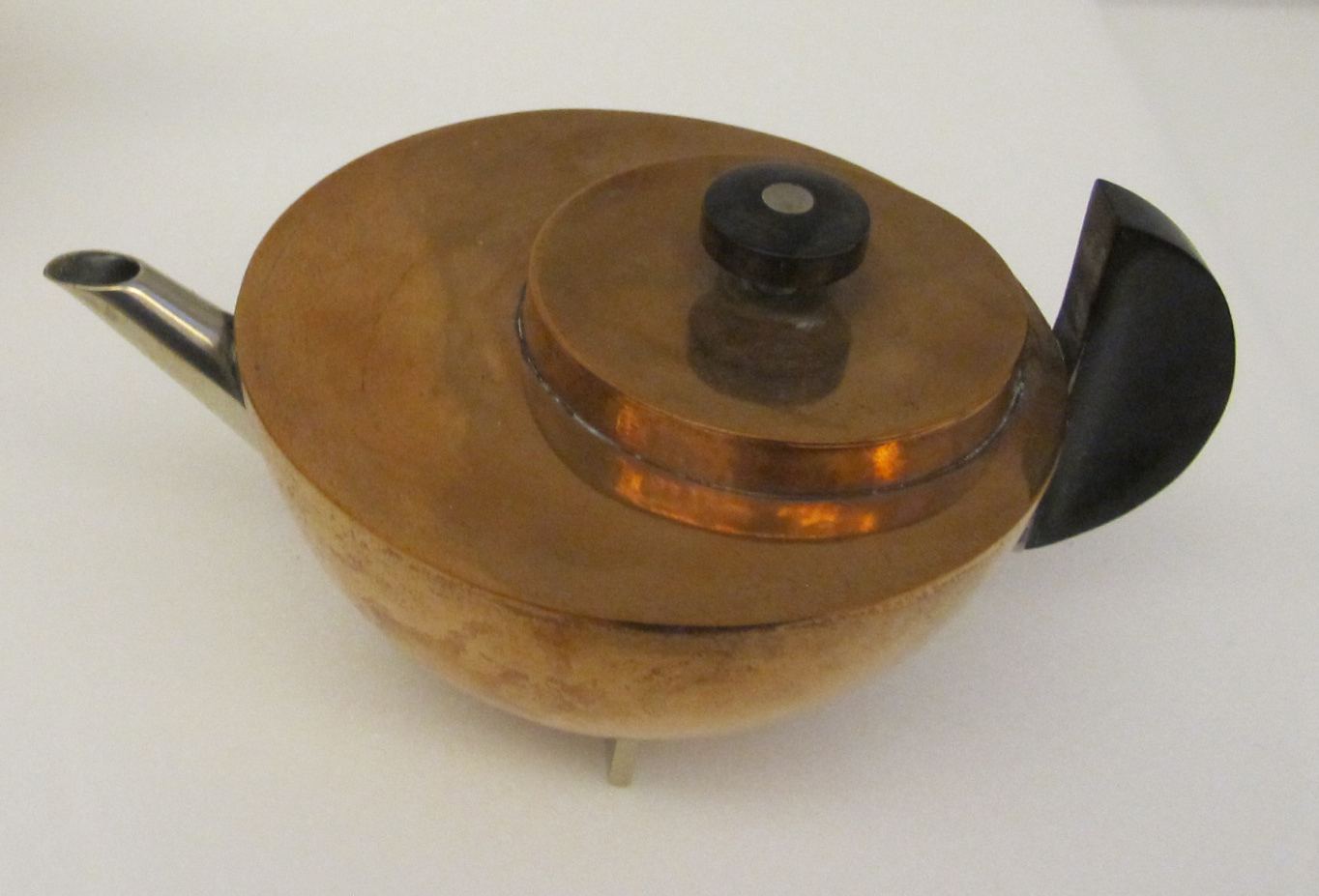 Marianne brandt, teiere, 1924 (cropped)